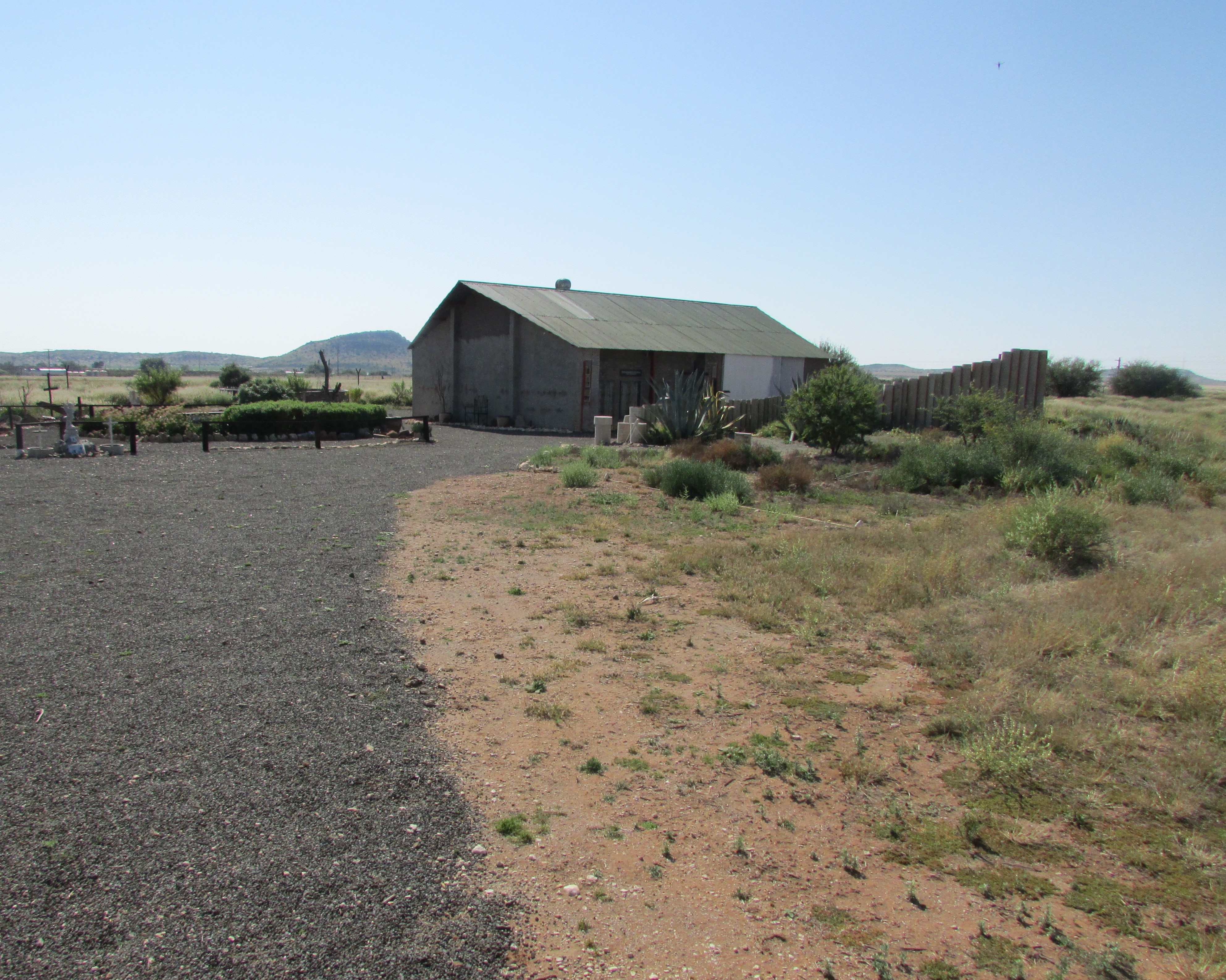 Doornbult terreinmuseum